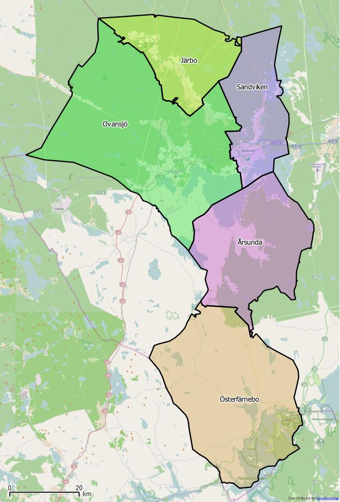 Distriktsindelningen i Sandvikens kommun World file: 141.15461757154596967 0 0 -141.15461757154596967 1795860.2152042705565691 8582212.79871243052184582